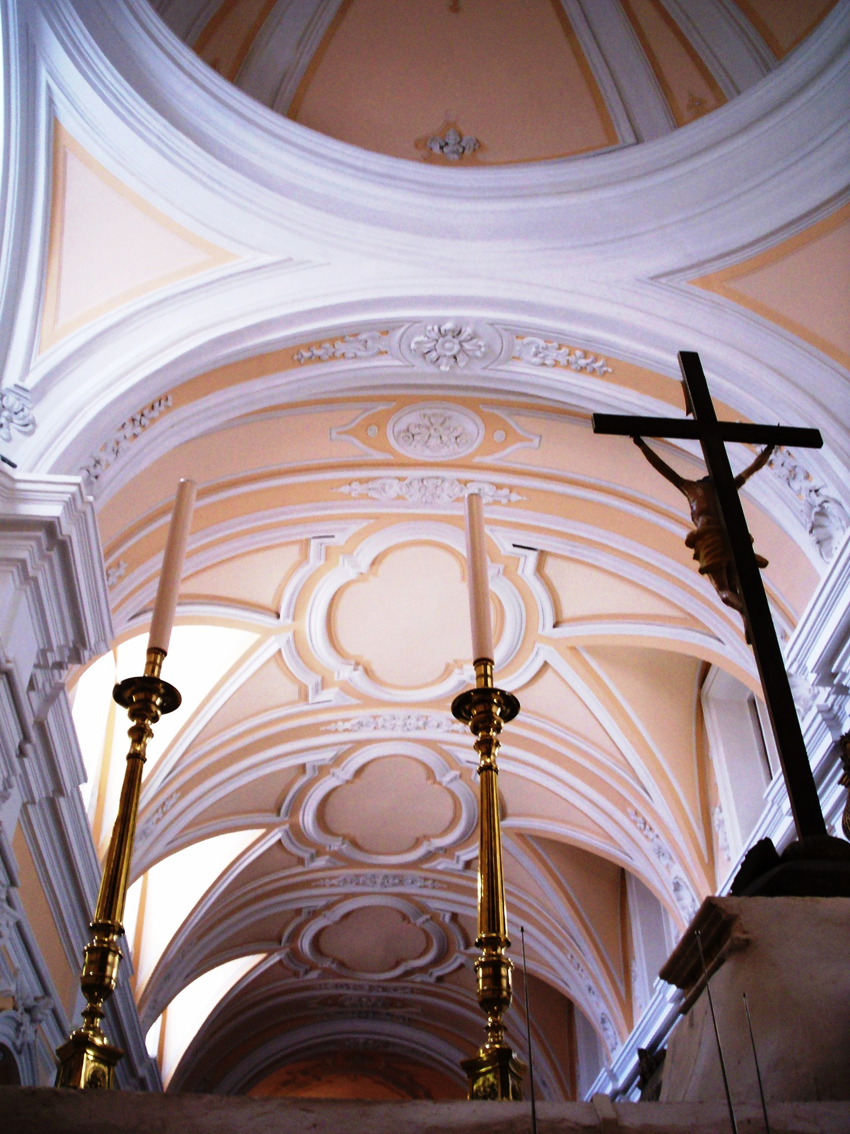 Volta della chiesa delle Clarisse in Cerreto Sannita (Bn).